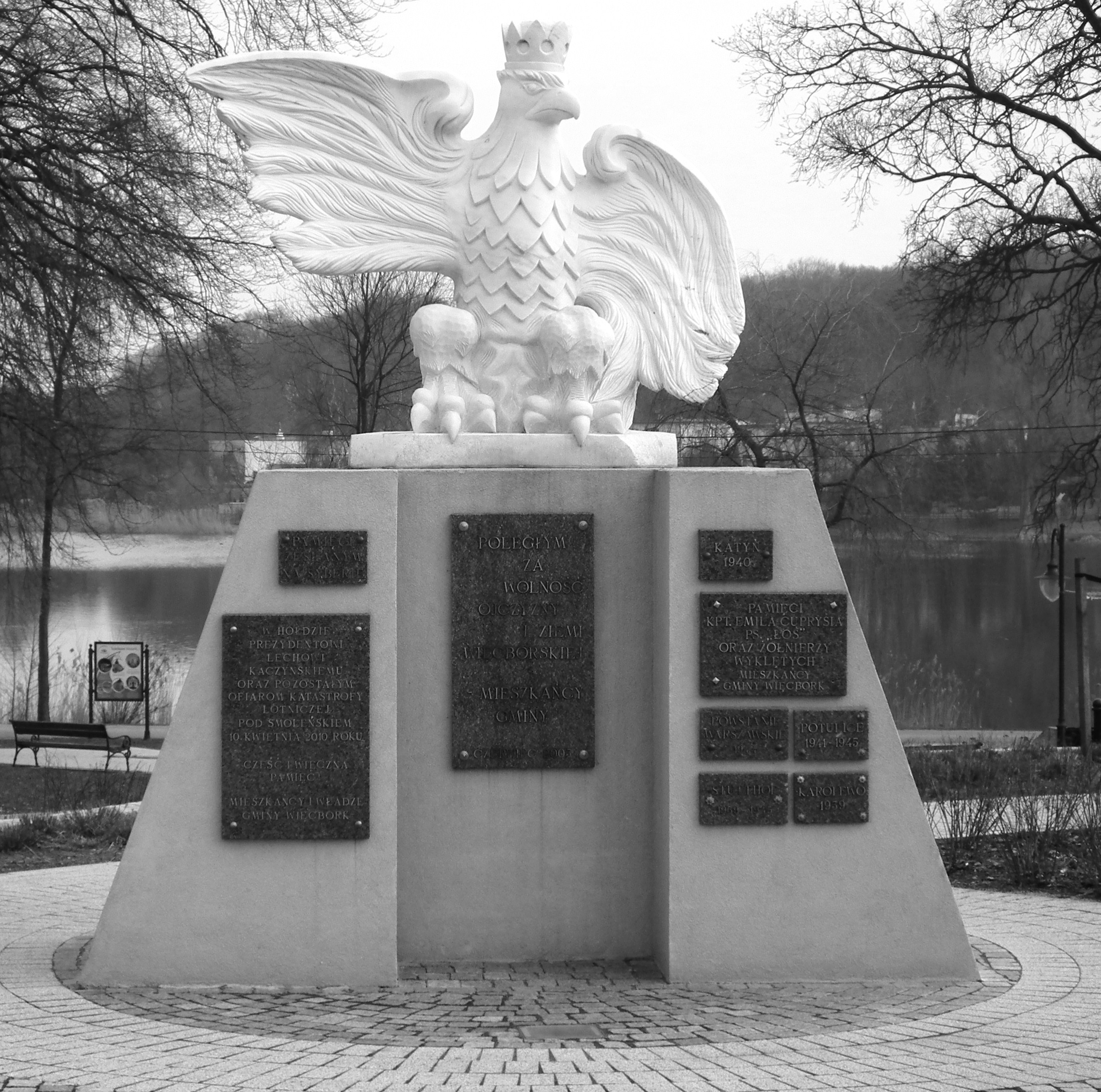 Pomnik na rynku w Więcborku.